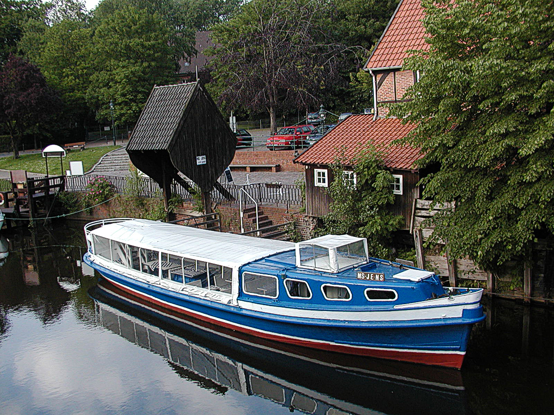 Die MS „Jens“ am Großen Specken in Otterndorf, Niedersachsen, Deutschland. Am Ufer der 5 m hohe (6,70 m über der Medem) Wellrad-Hafenkran. Diese 1922 bei Heidelmann in Lauenburg als WILHELM HELMKE gebaute Barkasse hat schon zwei große Unglücke überlebt. 1972 wurde sie vom Typ III Schiff EPPENDORF versenkt, Name damals CÄSAR II. 1977 sank sie wiederum dieses Mal unter dem Name HUBERT im Nord Ostsee Kanal. Abermals gehoben fährt sie nun als JENS seit 1980 auf der Medem. Jens_(Schiff,_1922)